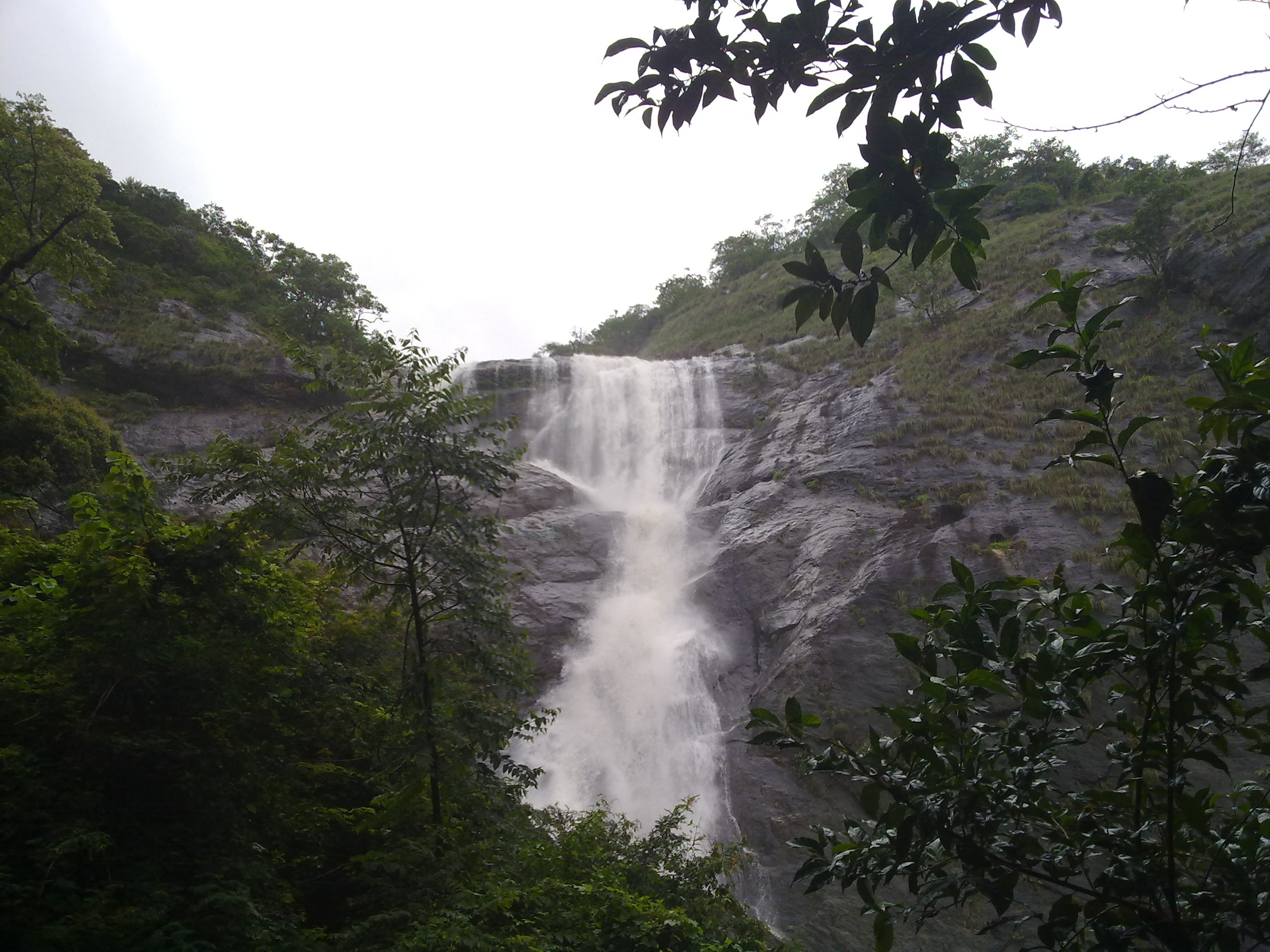 പാലരുവി വെള്ളച്ചാട്ടം